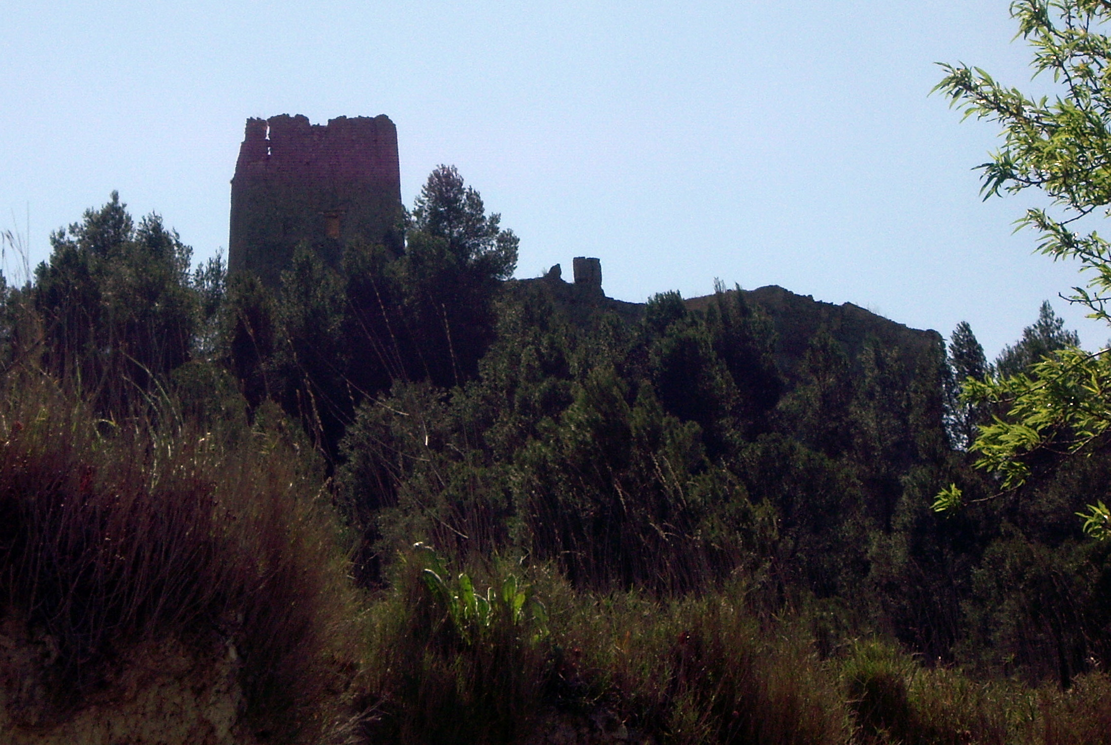 Castell de Barxell